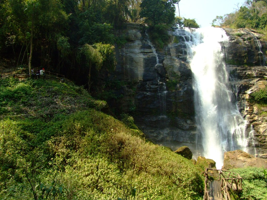 น้ำตกวชิรธาร อุทยานแห่งชาติดอยอินทนนท์